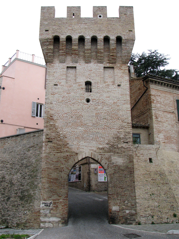 Porta Montana, Macerata, Italy